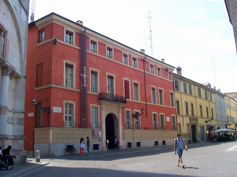 Parma - Palazzo Dalla Rosa Prati